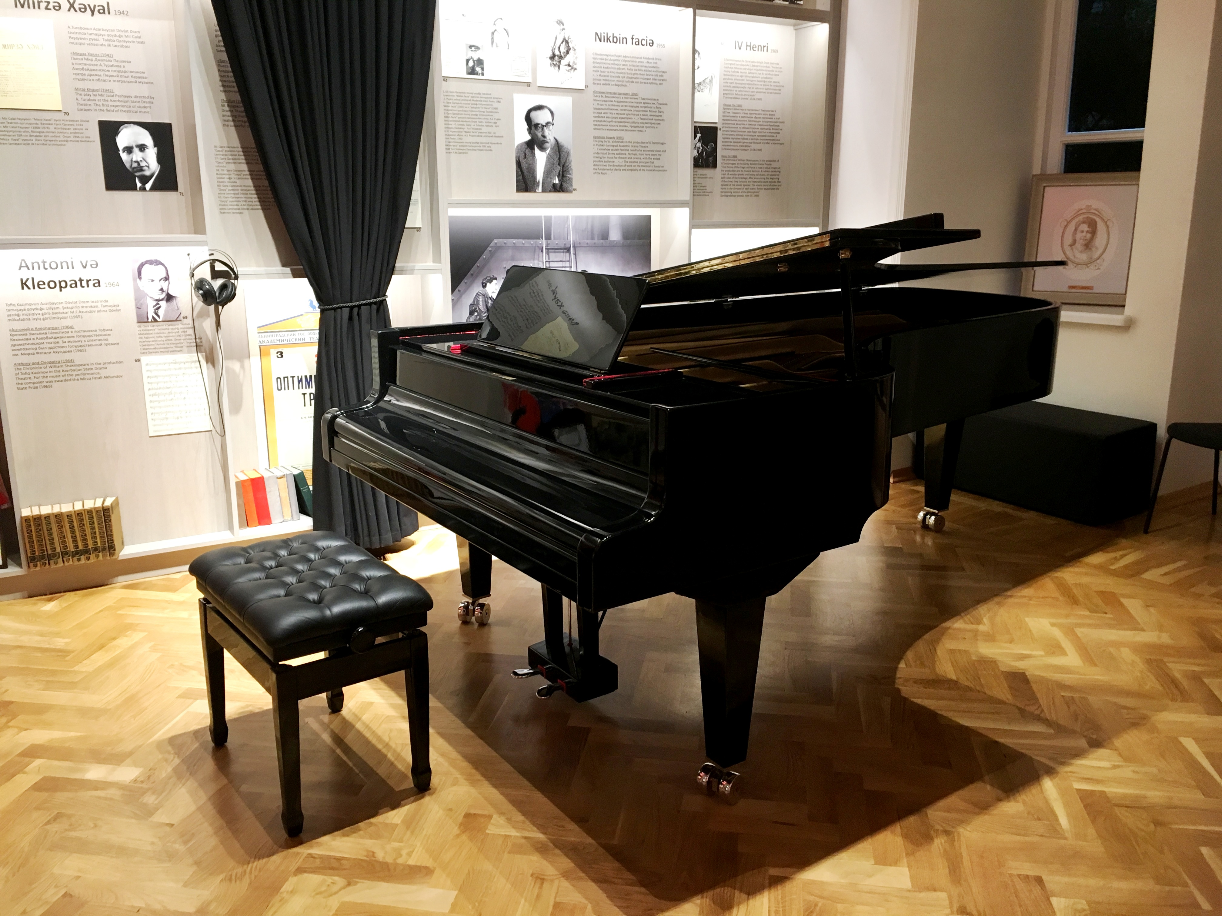 Q.Qarayevə məxsus piano